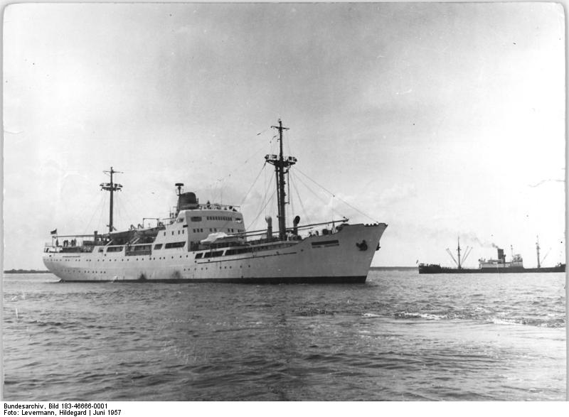 Rostock, Hafen, sowjetisches Forschungsschiff Zentralbild-Levermann; Rostock-20.6.1957 Sowjetisches Forschungsschiff "Michail Lomonossow" auf Probefahrt. Ein modernes Forschungsschiff, das im Auftrag der Akademie der Wissenschaften der UdSSR in der Rostocker Neptunwerft gebaut wurde, ist zu seiner ersten Probefahrt ausgelaufen. Es wurde auf den Namen des hervorragenden russischen Naturforschers "Michail Lomonossow" getauft. Das schnittige Foschungsschiff soll während des III. Internationalen Geophysikalischen Jahres, das im Juli 1957 beginnt, ozeanographische Forschungen im Atlantischen Ozean von den Ufern Grönlands bis zur Anarktis durchführen. Es wird unter anderem gemeinsam mit Fahrzeugen der Bundesrepublik und Frankreichs Untersuchungen im Bereich des Atlantischen Ozeans zwischen dem 30. und 70. Breitengrad und dem 40. Längengrad durch einem vom Internationalen Rat zum Studium der Meere in Kopenhagen bestätigten Programm anstellen. UBz: Die "Michail Lomonossow" auf Probefahrt